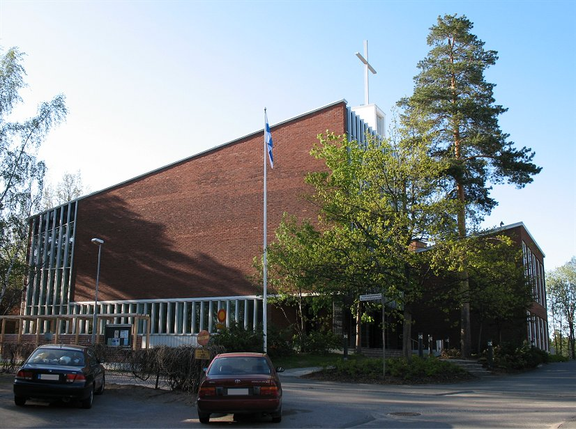 Pitajanmaki Church, photo 1, situated in the Pitäjänmäki district of Helsinki, Finland. (In Finnish: Pitäjänmäen kirkko Helsingin Pitäjänmäessä)